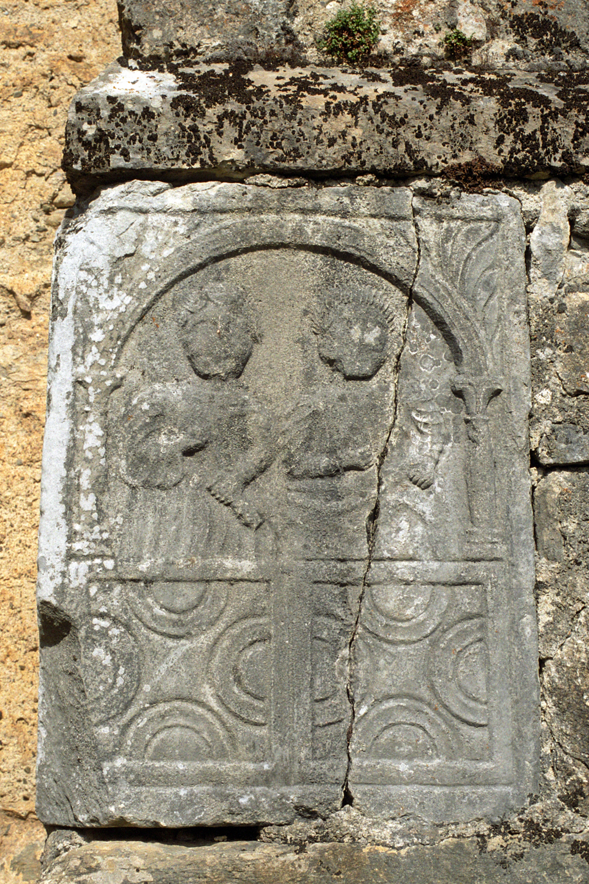 France - Pyrénées - Comminges - Chapelle Saint-Pé de la Moraine